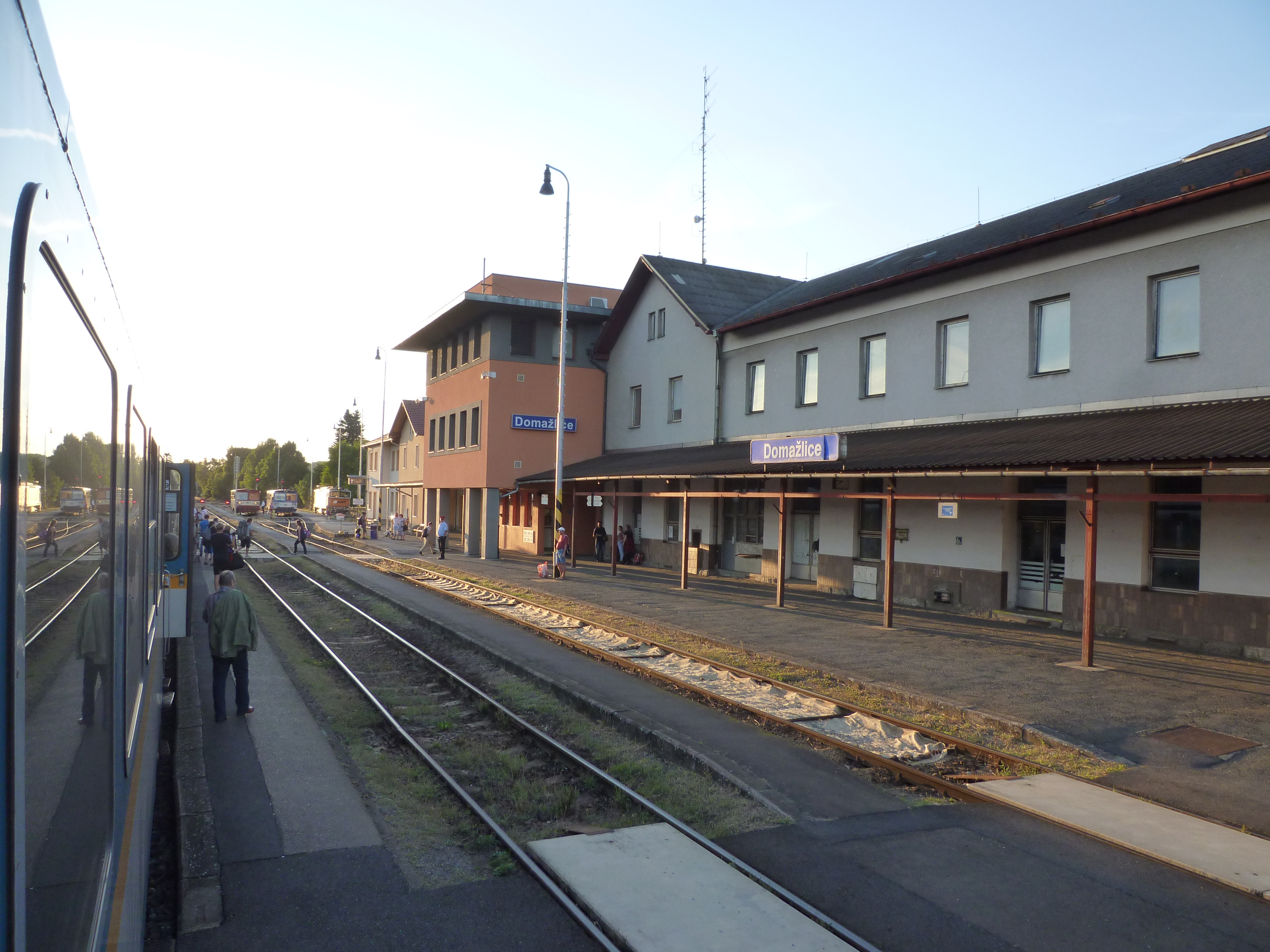 Bahnhof und Bahnsteig in Domazlice, Tschechien.